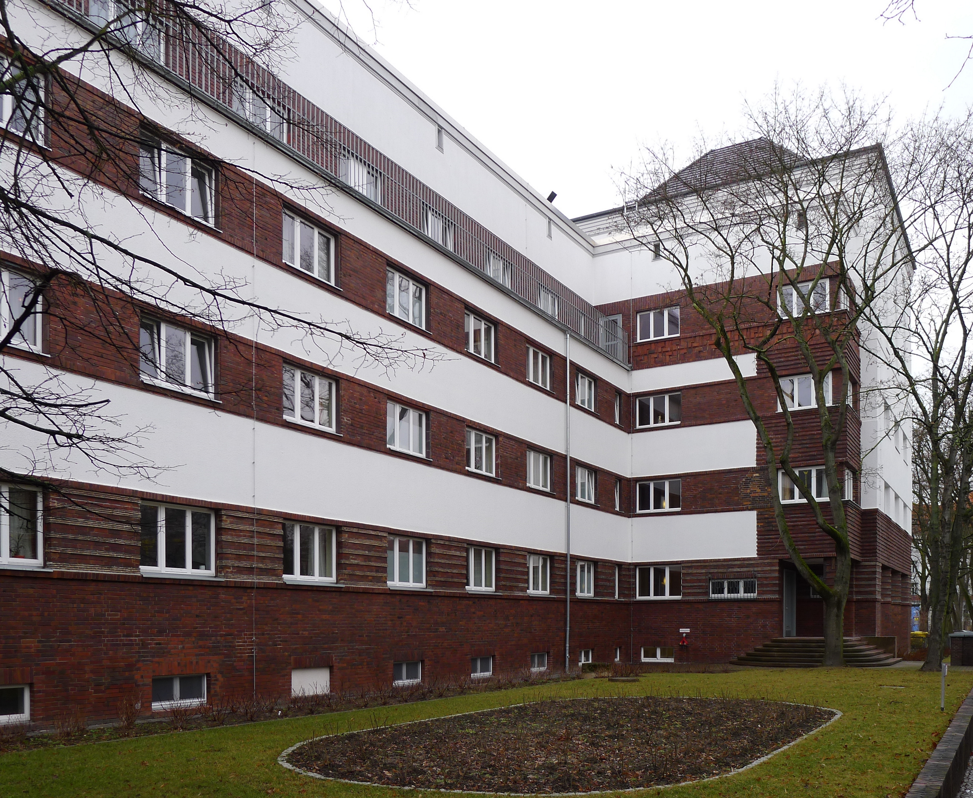 Ehemaliges jüdisches Altersheim, heute Seniorencentrum von Vivantes